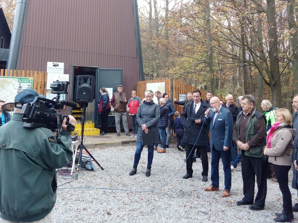 Projevy starostů Mělnicka při znovuotevření rozhledny na Vrátenské hoře po rekonstrukci dne 28. října 2019, hovoří Ctirad Mikeš